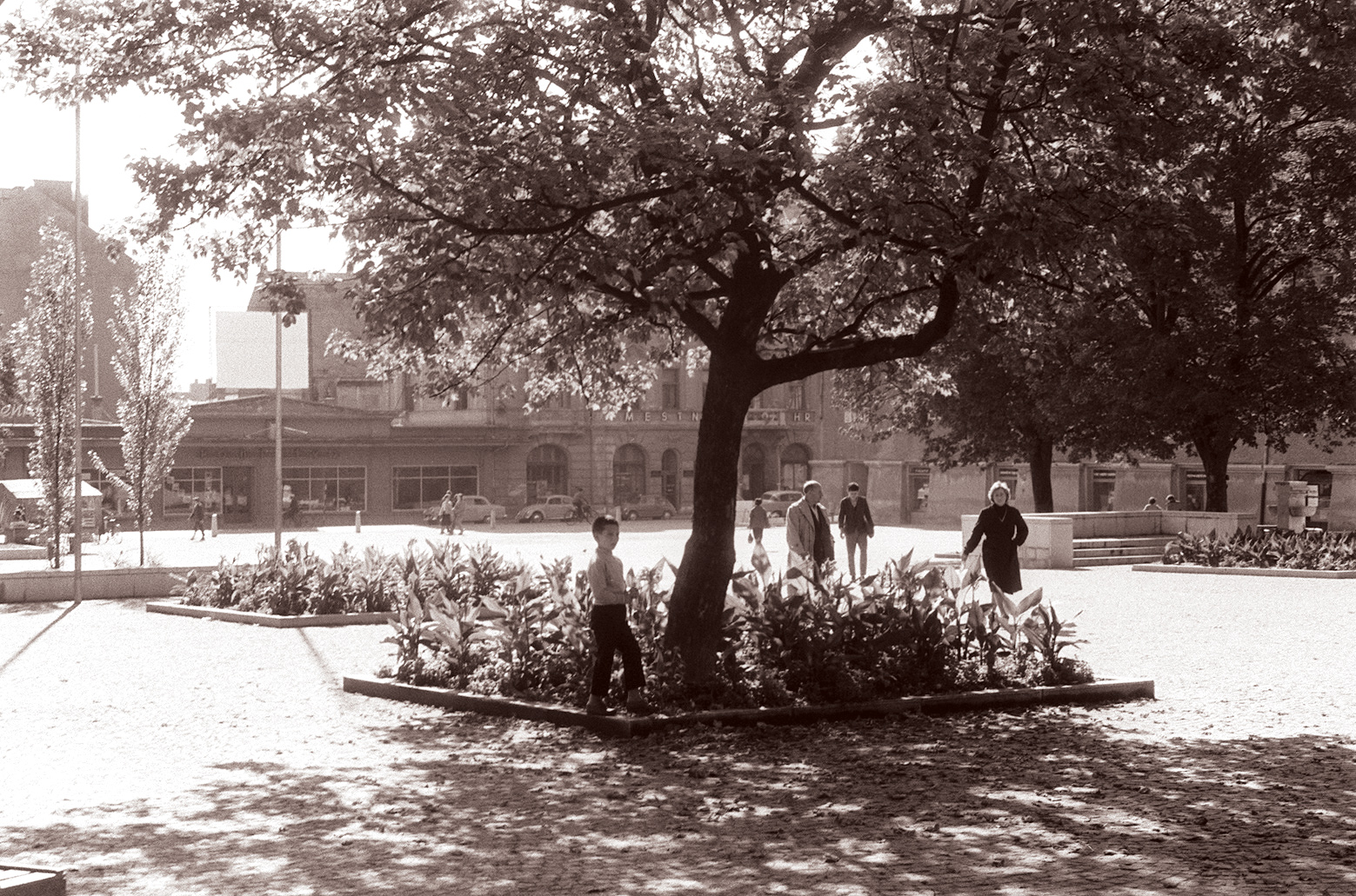 Trg svobode v Mariboru